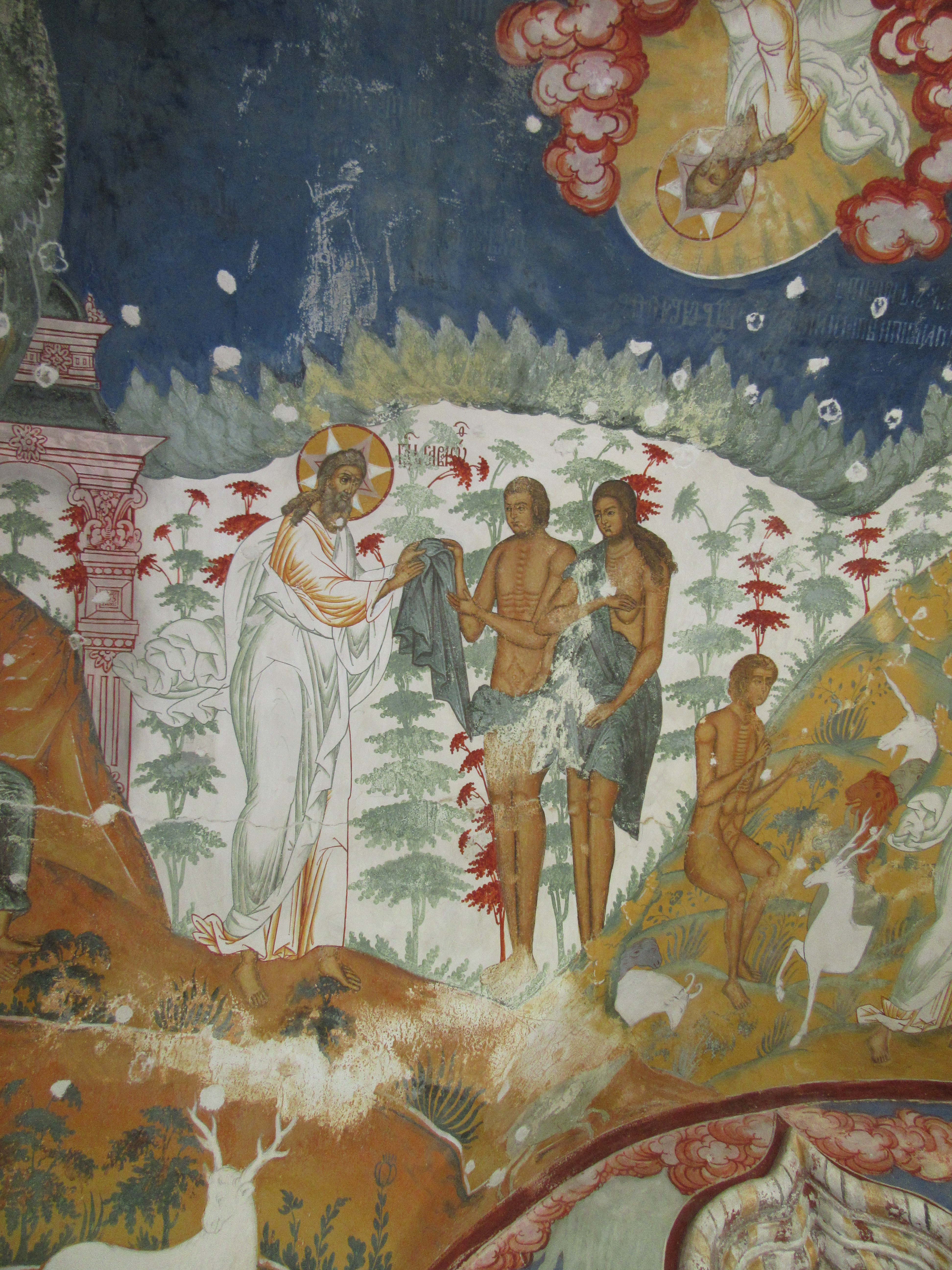 Adam et Eve, expulsés du paradis reçoivent des vêtements